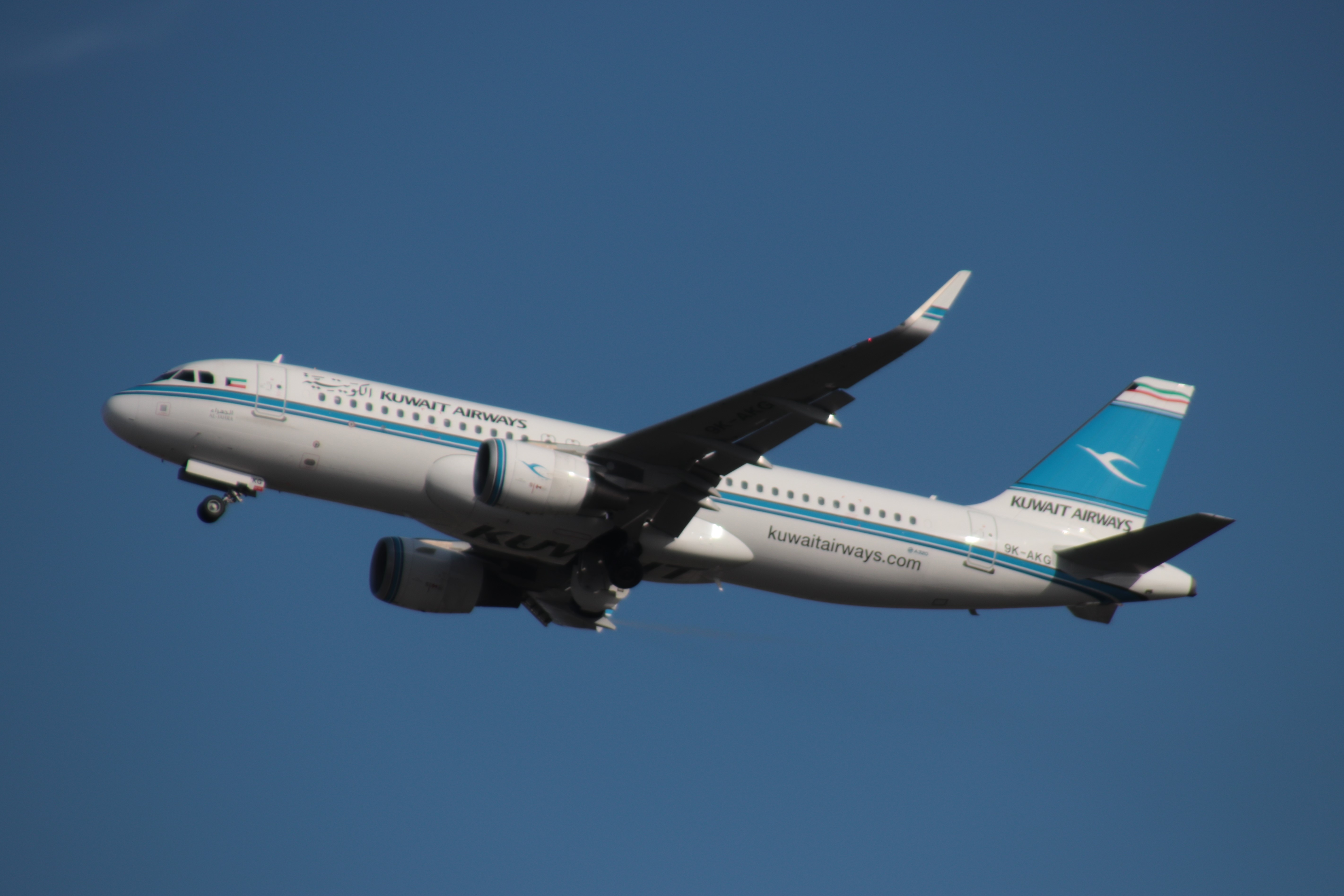 Uno dei 13 A320 di Kuwait Airways in decollo all'aeroporto di Milano Malpensa.